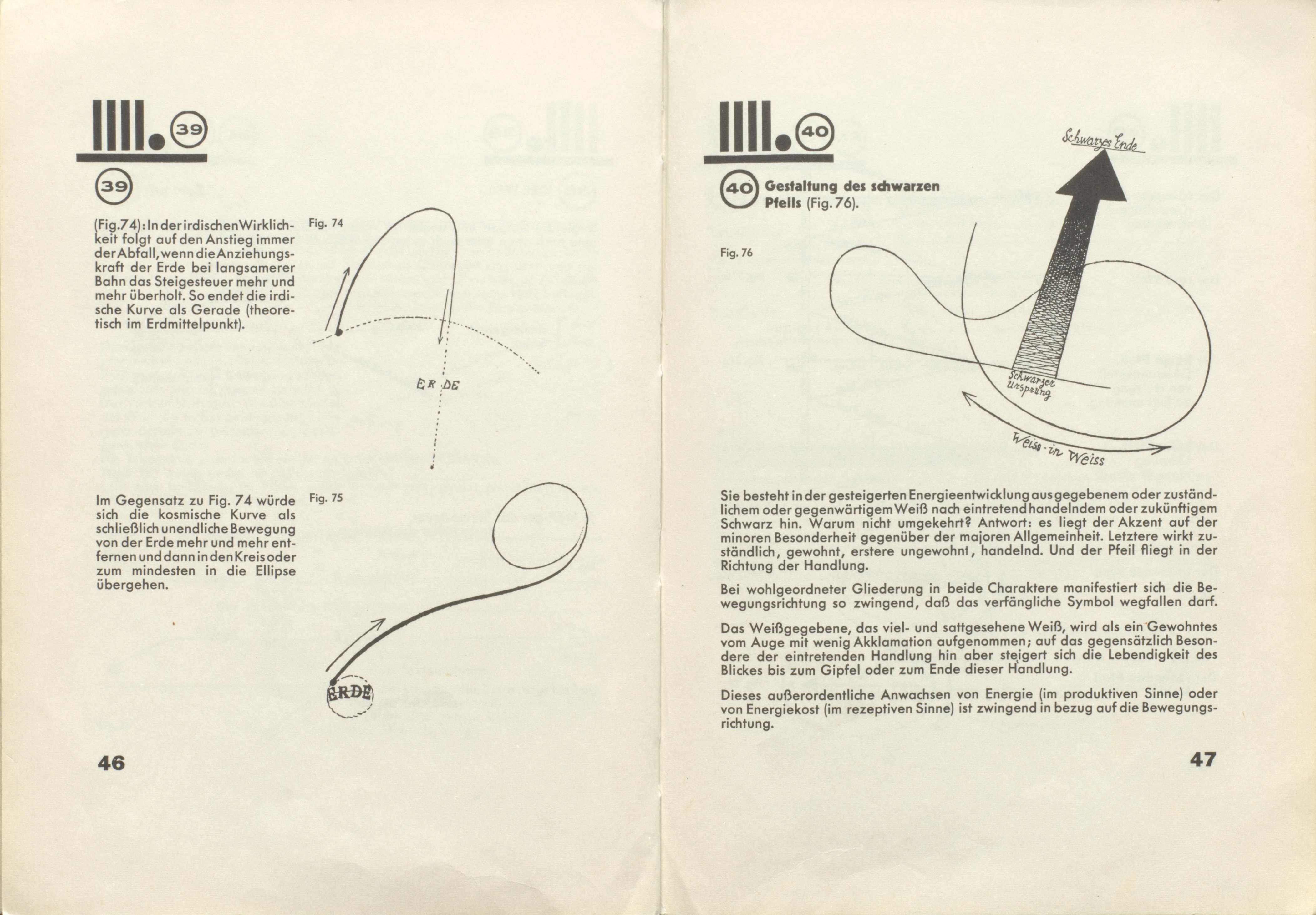 Paul Klee: Pädagogisches Skizzenbuch. Bauhausbücher, Band 2, München 1925, Seite 46